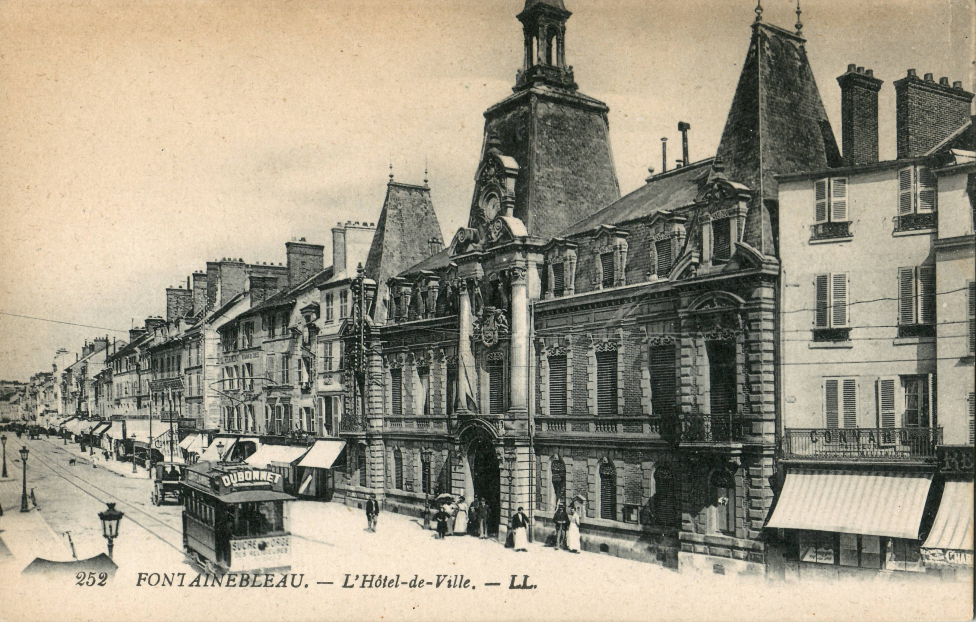 Carte postale ancienne éditée par LL, N°252 : FONTAINEBLEAU - L'Hôtel-de-Ville